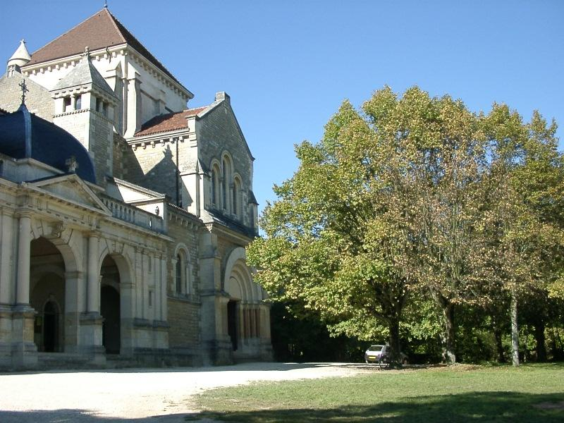 Basilique et maison natale de Bernard de Clairvaux à Fontaine-lès-Dijon.